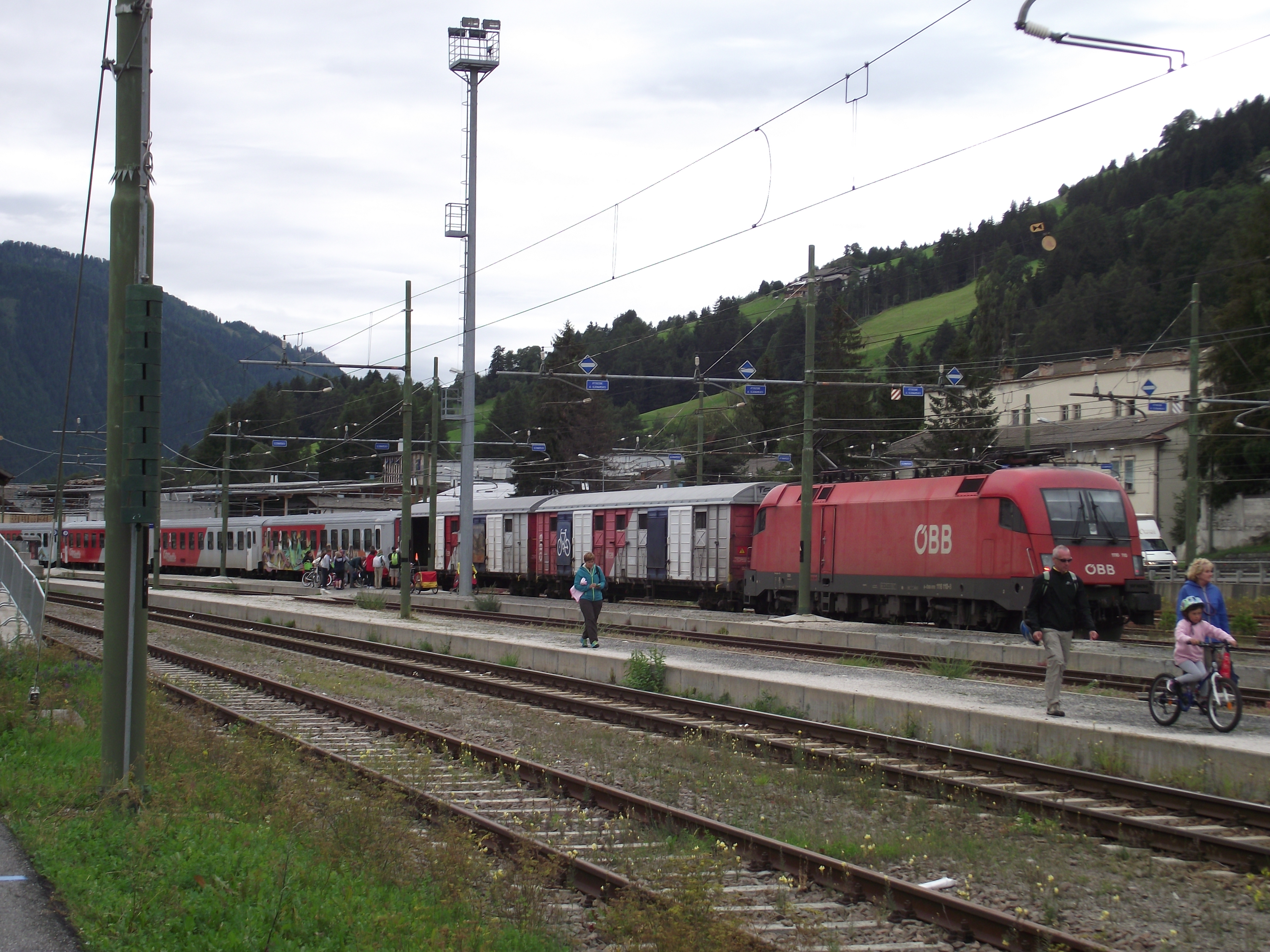 Zug der ÖBB in der Station Innichen / San Candido mit Extrawagons für den Fahrradtransport auf der Strecke Lienz - Innichen.